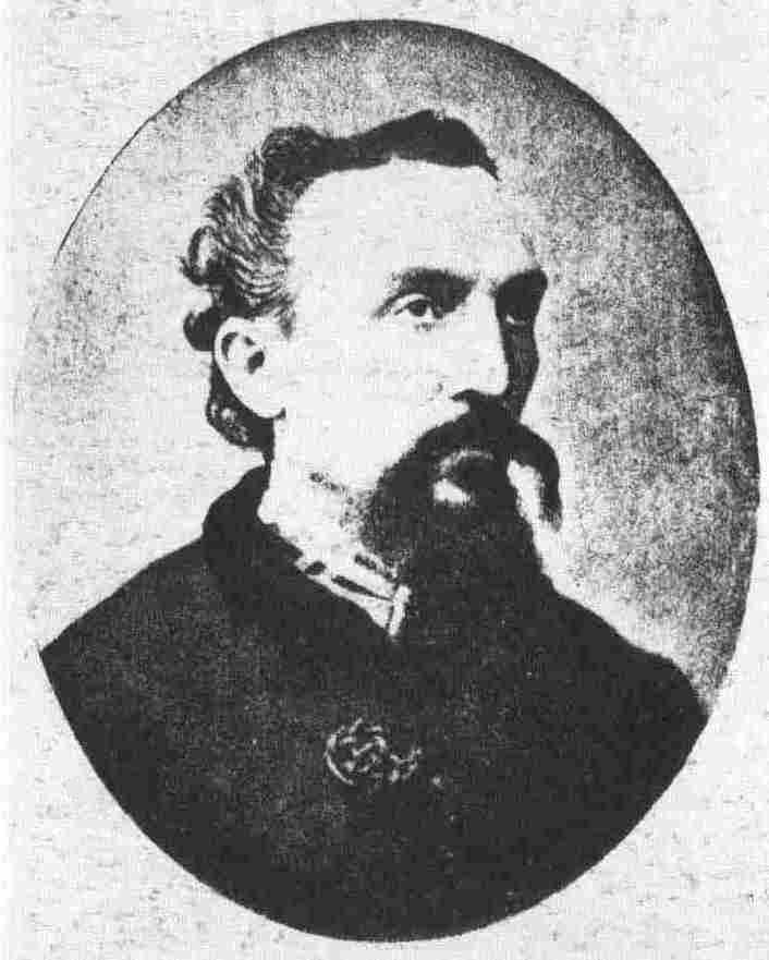 Faustino Tanara (1831-1876), patriota del Risorgimento italiano.